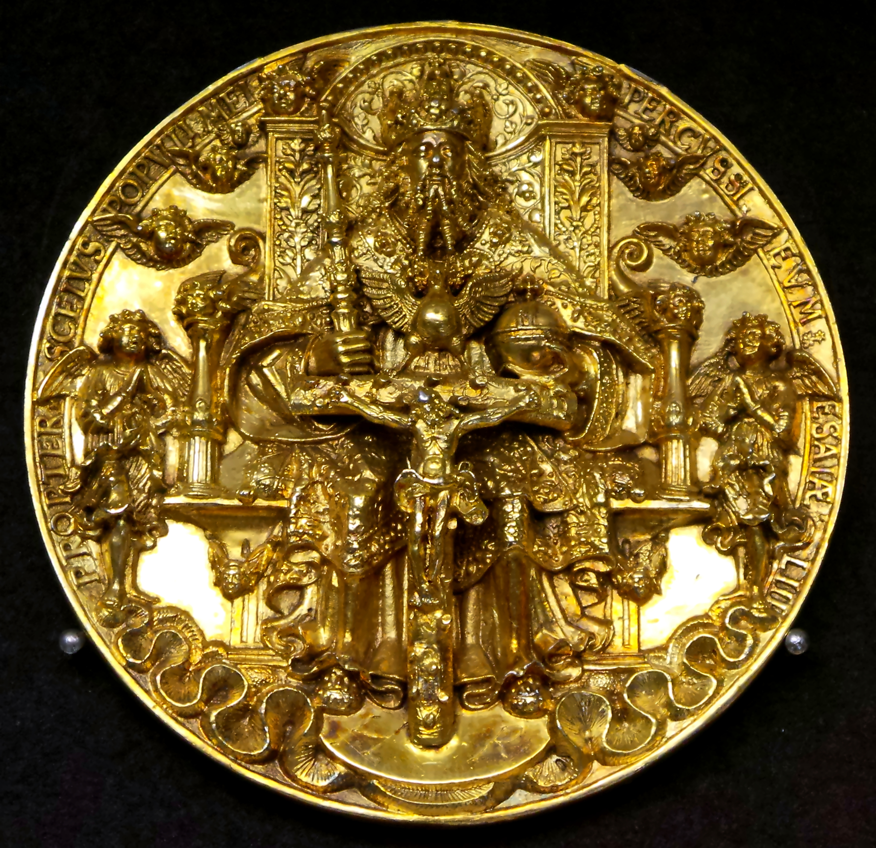 Originale Dreifaltigkeitsmedaille (Leipzig 1544), die aus einem Stück in Silber gegossenen und nach dem Guß geglättet sowie nachbearbeitet wurde. Das Kruzifix wurde einzeln gegossen und aufgelötet. Die Vorderseite der Medaille wurde mit einer Feuervergoldung behandelt und einzelne Partien vermutlich noch einmal nachvergoldet. Das Kunstwerk ist im Trierer Dom (Domschatz) ausgestellt.